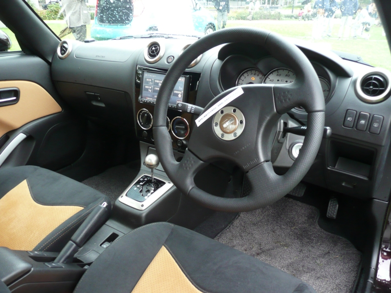 Daihatsu Copen interior.